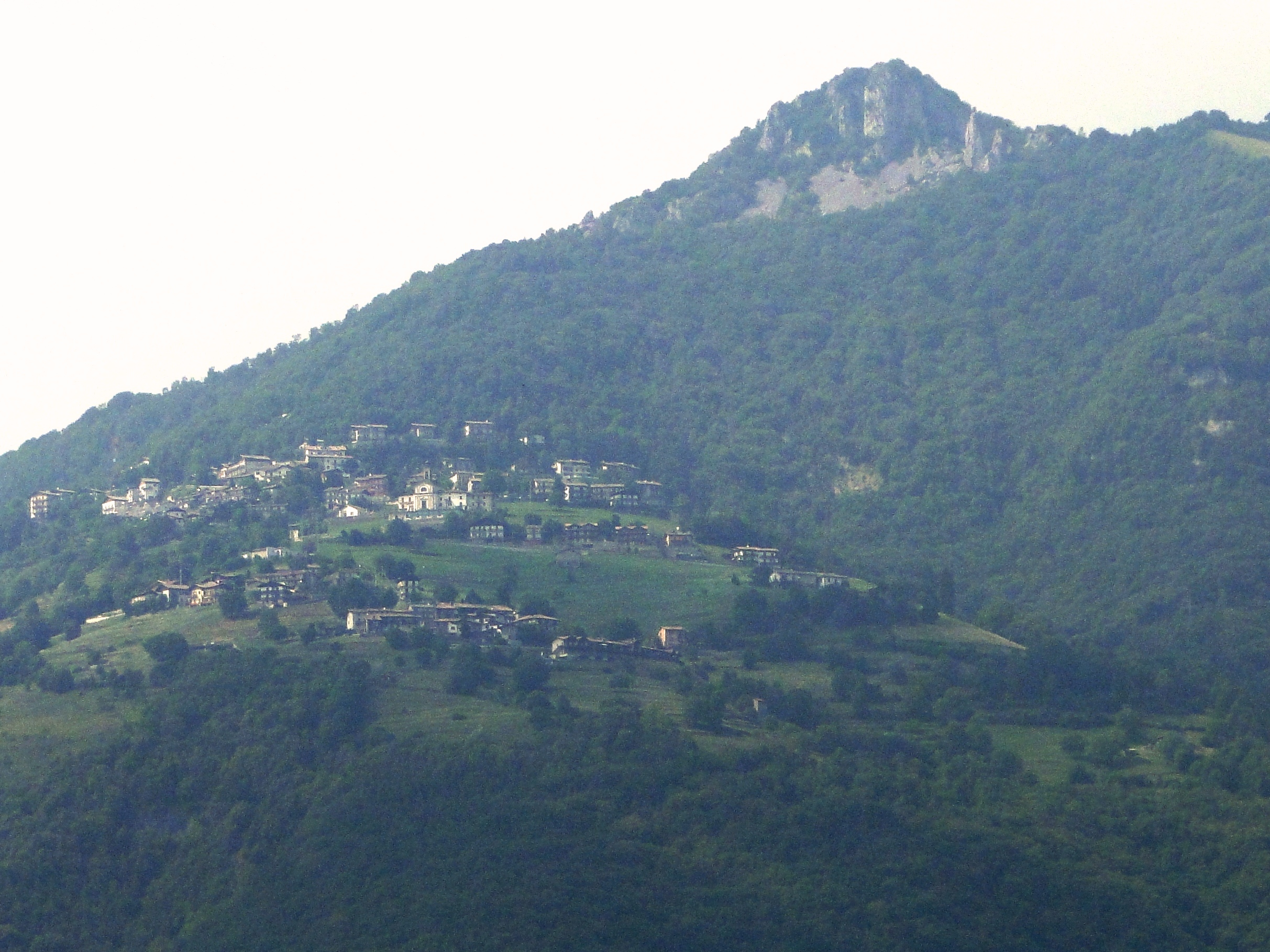 Vista di Amora, fraz. di Aviatico (BG)